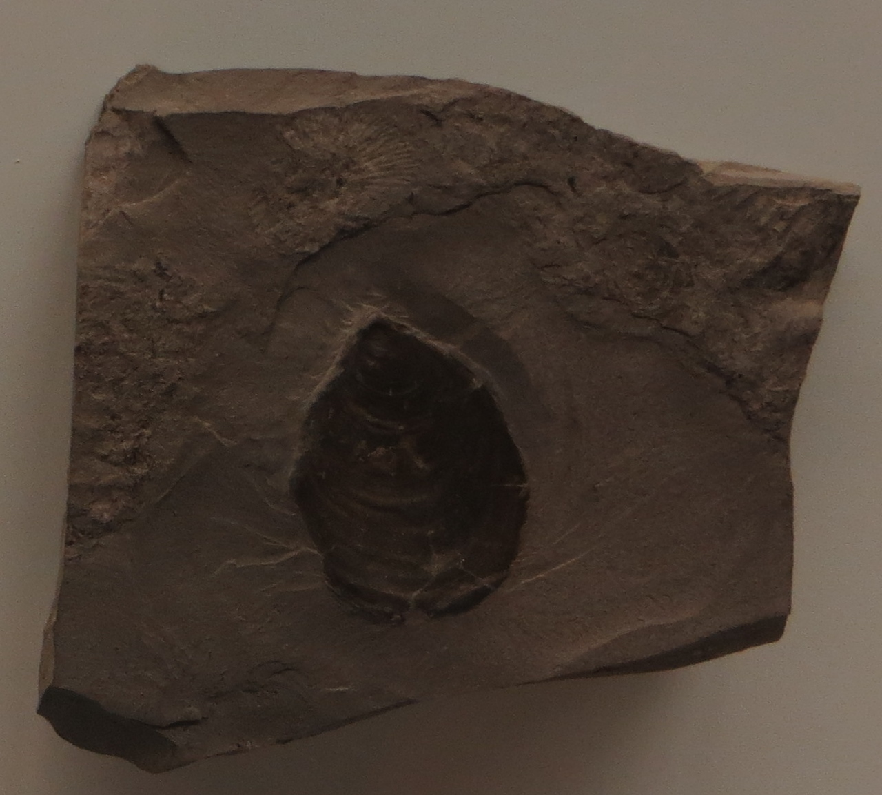 Fossil of Pseudomytiloides- Took the picture at Museum am Lowentor, Stuttgart